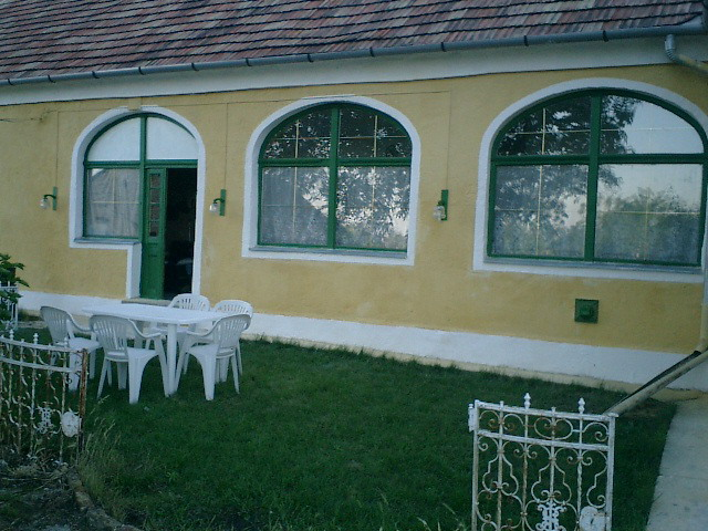 Besnyői volt plébániaépület felújítás után